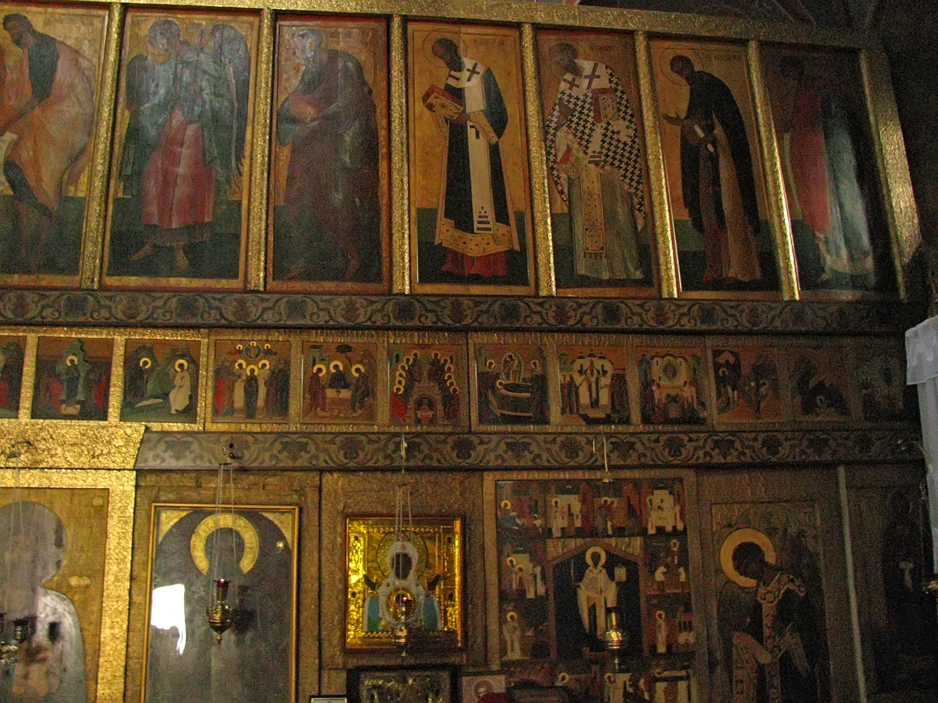 Церква Св. Василія (мур.), Овруч, вул.Пролетарська, 2